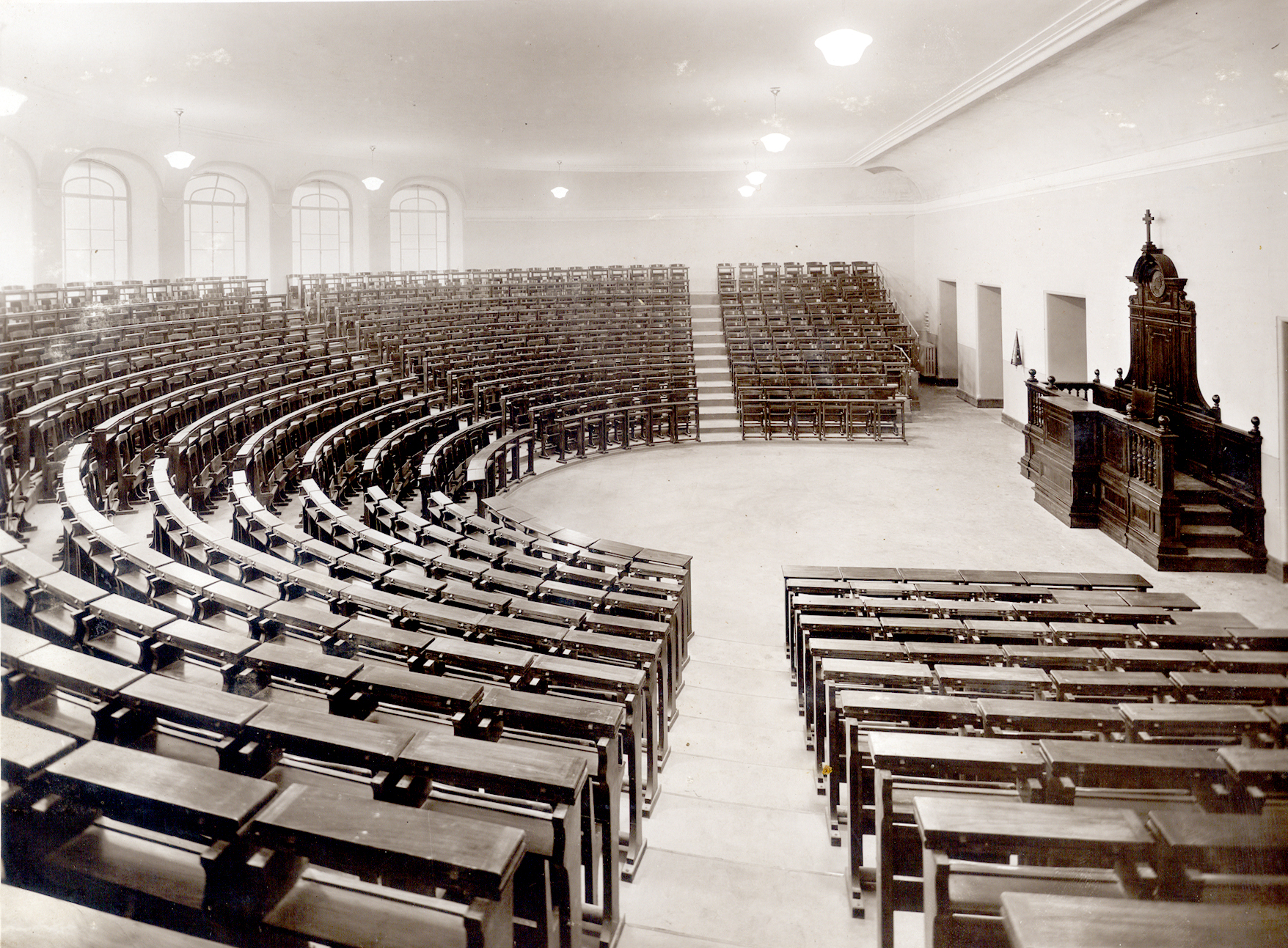 Pontificia Università Gregoriana in Roma. Aula interna